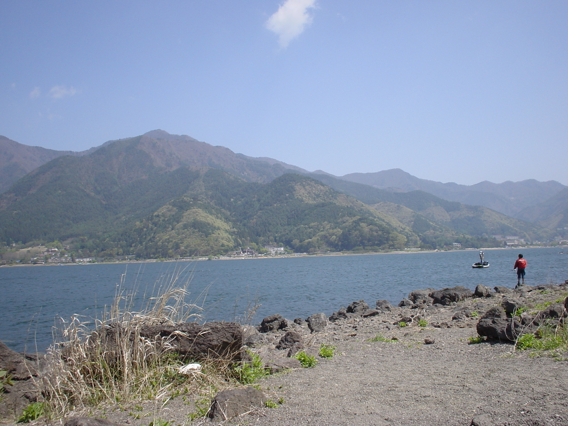 Lake Kawaguchi